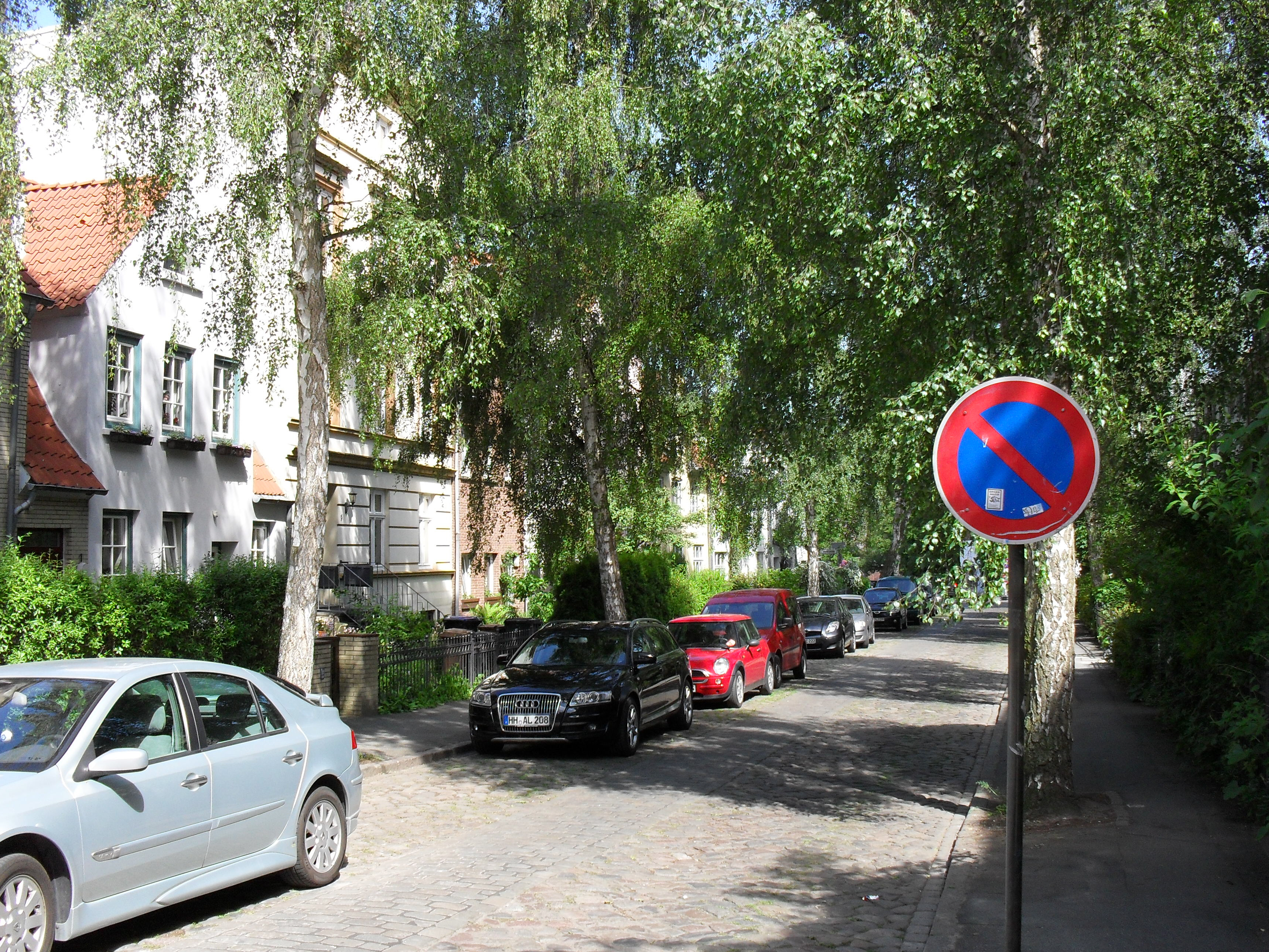 Der Weite Lohberg in Lübeck